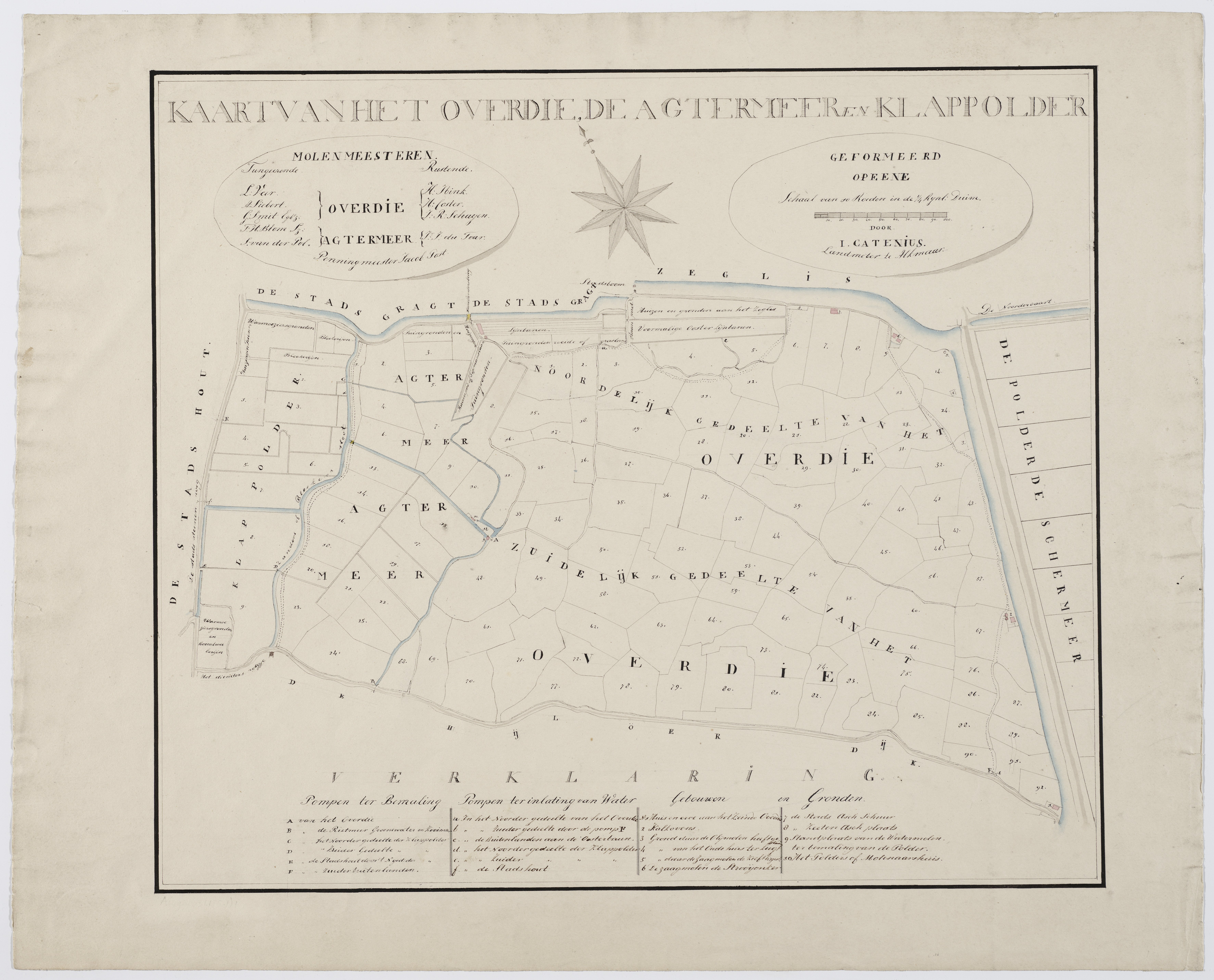 19e eeuw, mogelijk uit 1812; zie File:Overdie en Achtermeer 1812 (25979513710).jpg